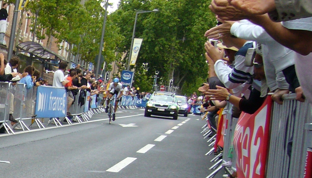 Le coureur cycliste espagnol Alberto Contador lors du contre la montre d'Albi du Tour de France 2007Alberto Contador during the 2007 Tour de France TT in Albi.